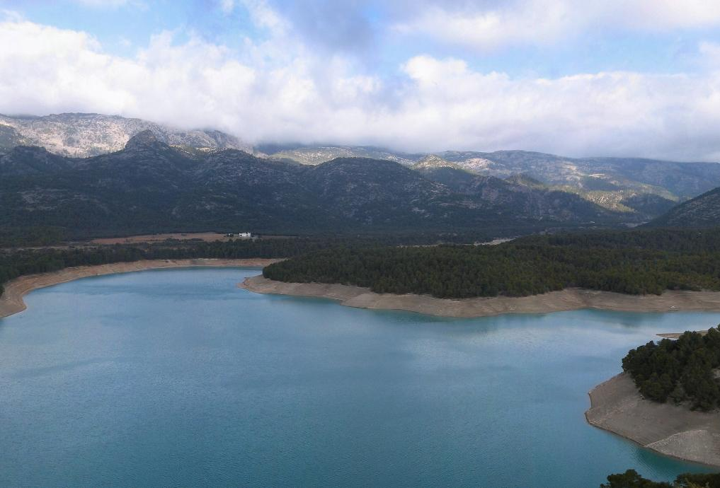 Pantano de la Bolera, en el río Guadalentín.